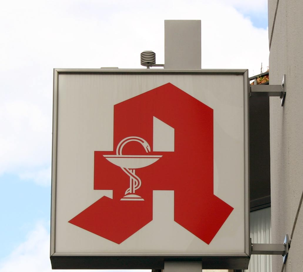 Apothekenlogo Deutschland in Hanau, Deutschland